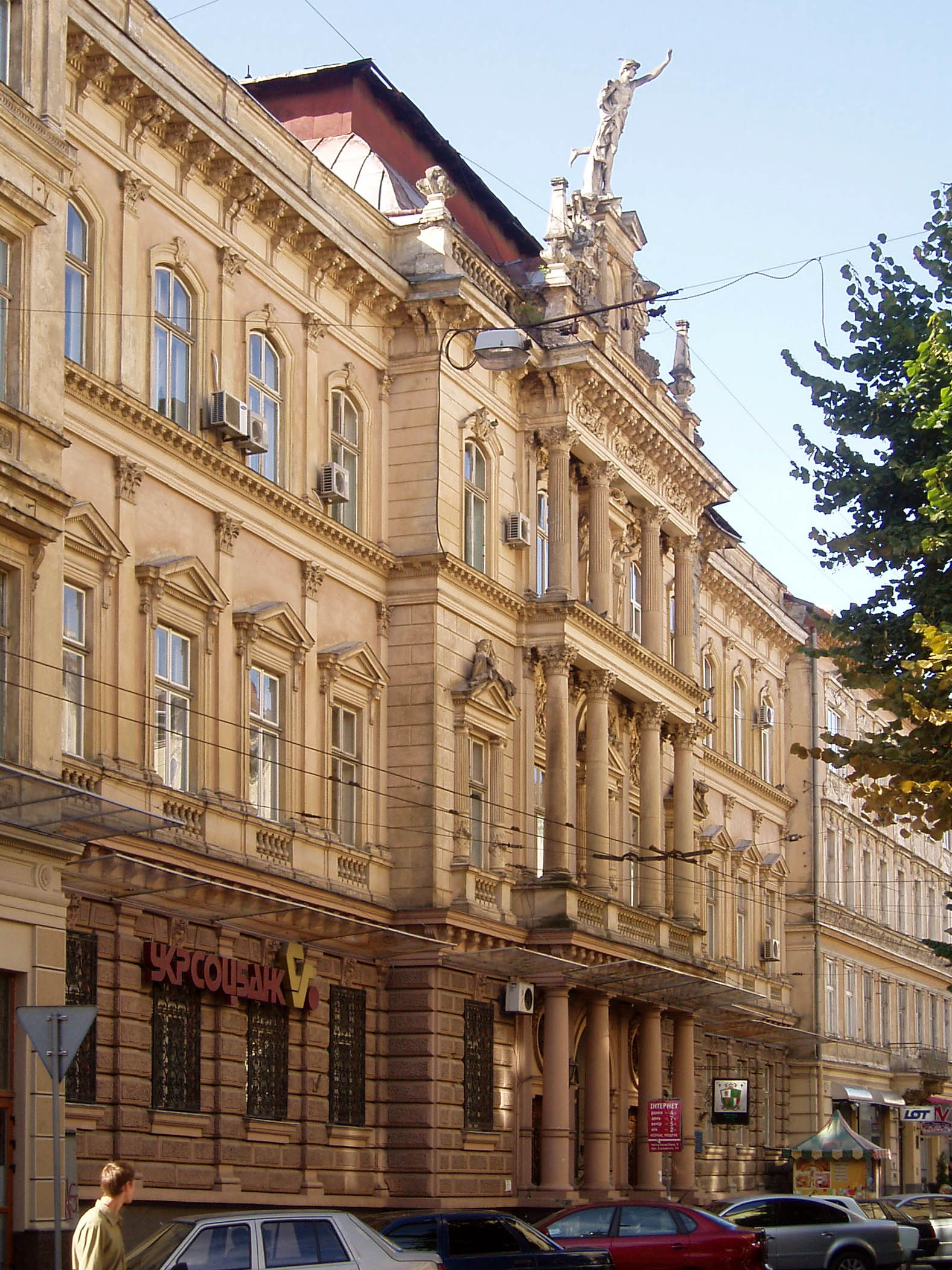 Колишній дім дирекції залізниць на вулиці Січових Стрільців, 3 у Львові. Архітектор Архітектор Вінцент Равський-молодший (1857—1927), співавтор фасаду, і автор скульптурного оздоблення Леонард Марконі (1835—1899).